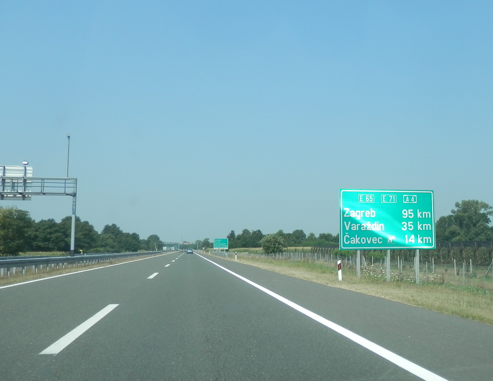 Diaľnica A4 za hraničným prechodom Goričan. Chorvátsko, leto 2013.